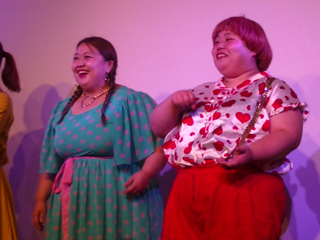 どんぐりパワーズ (2018年8月22日)